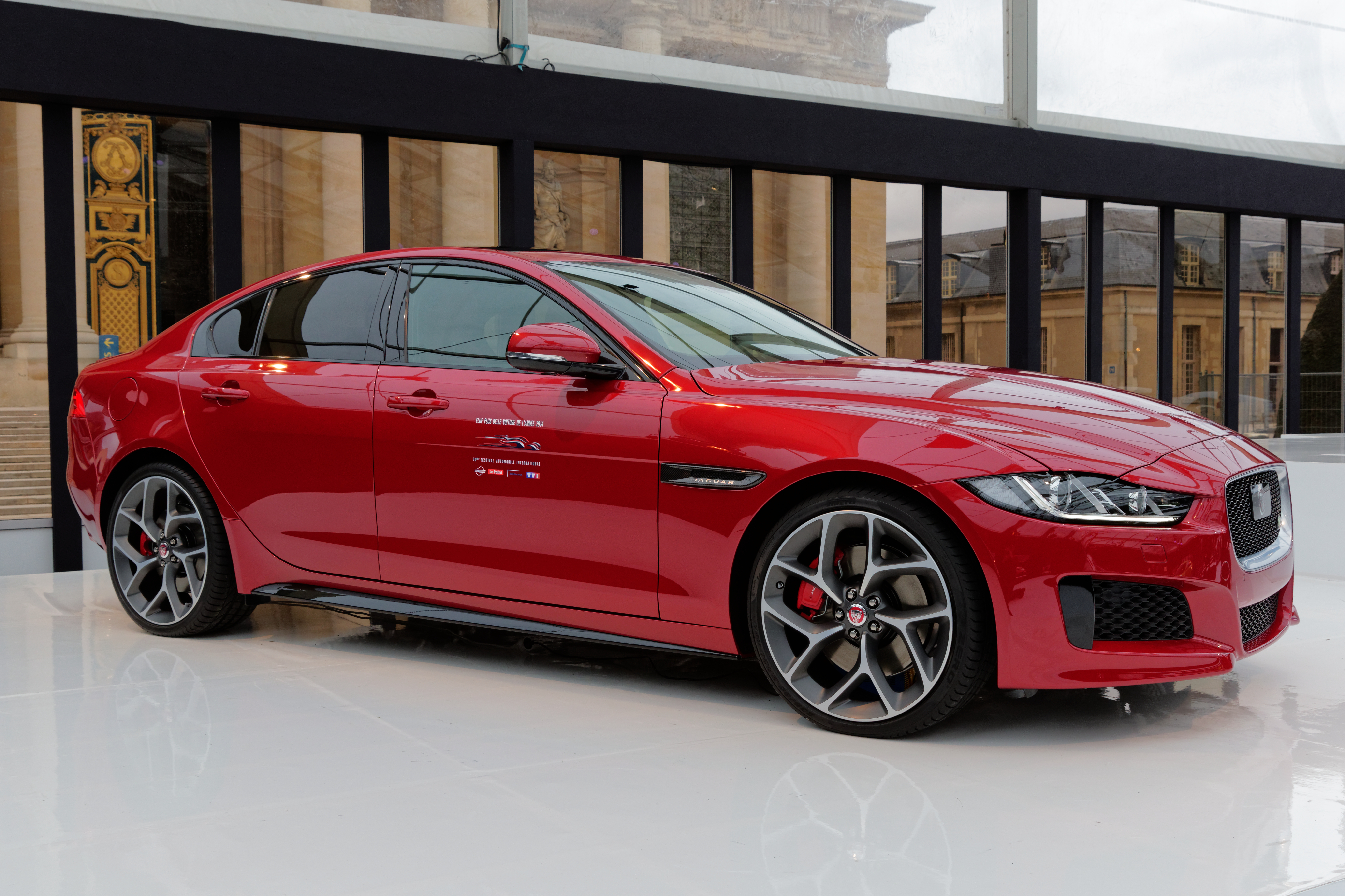 La Jaguar XE exposée lors du festival automobile international 2015.